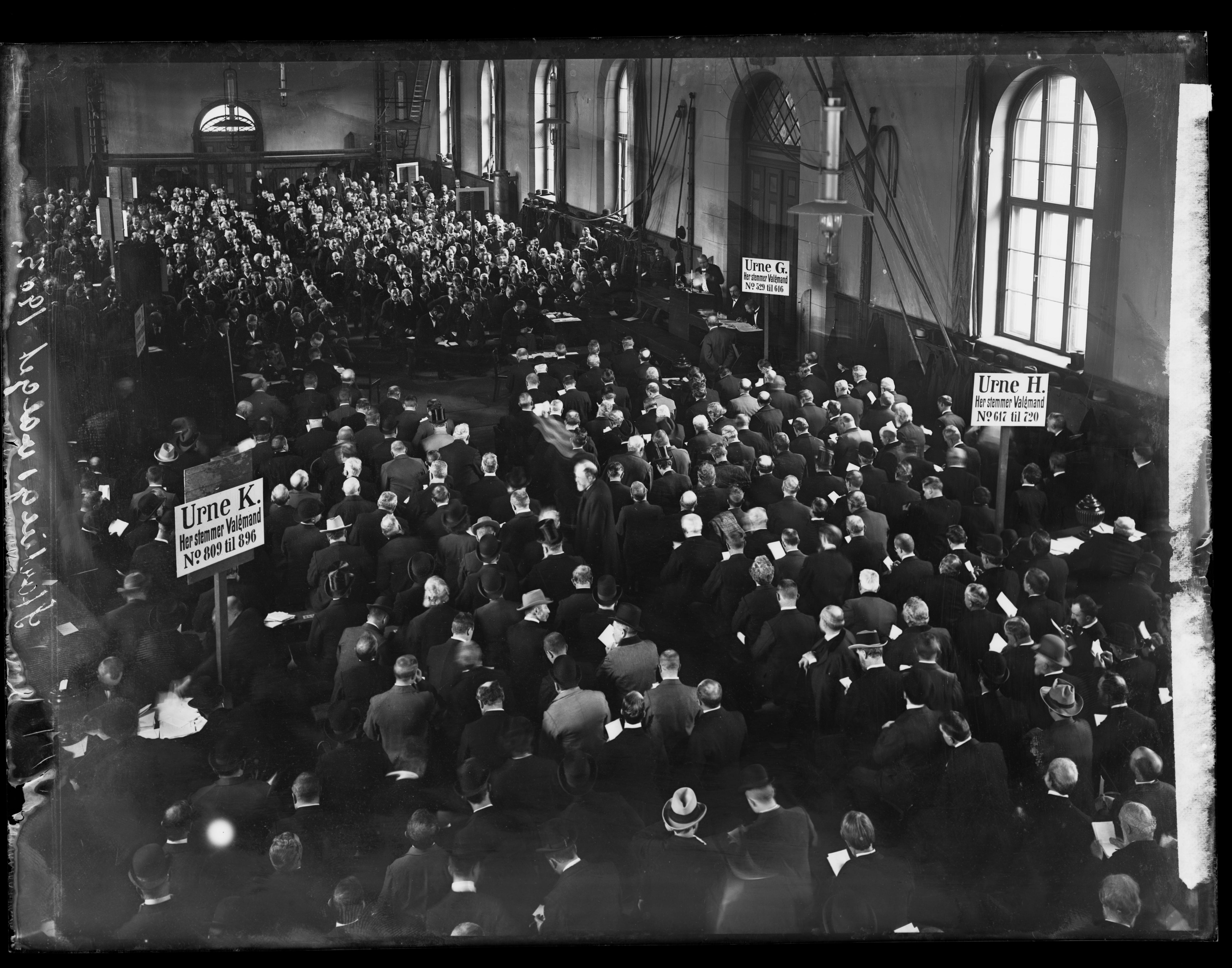 Bildet er hentet fra Nasjonalbibliotekets bildesamling. Anmerkninger til bildet var: Påskrift arkivark: Storthingsvalget 1903 Eldste arkivnummer: 467 Yngre arkivnummer: 61, 412 Oslo, Oslo